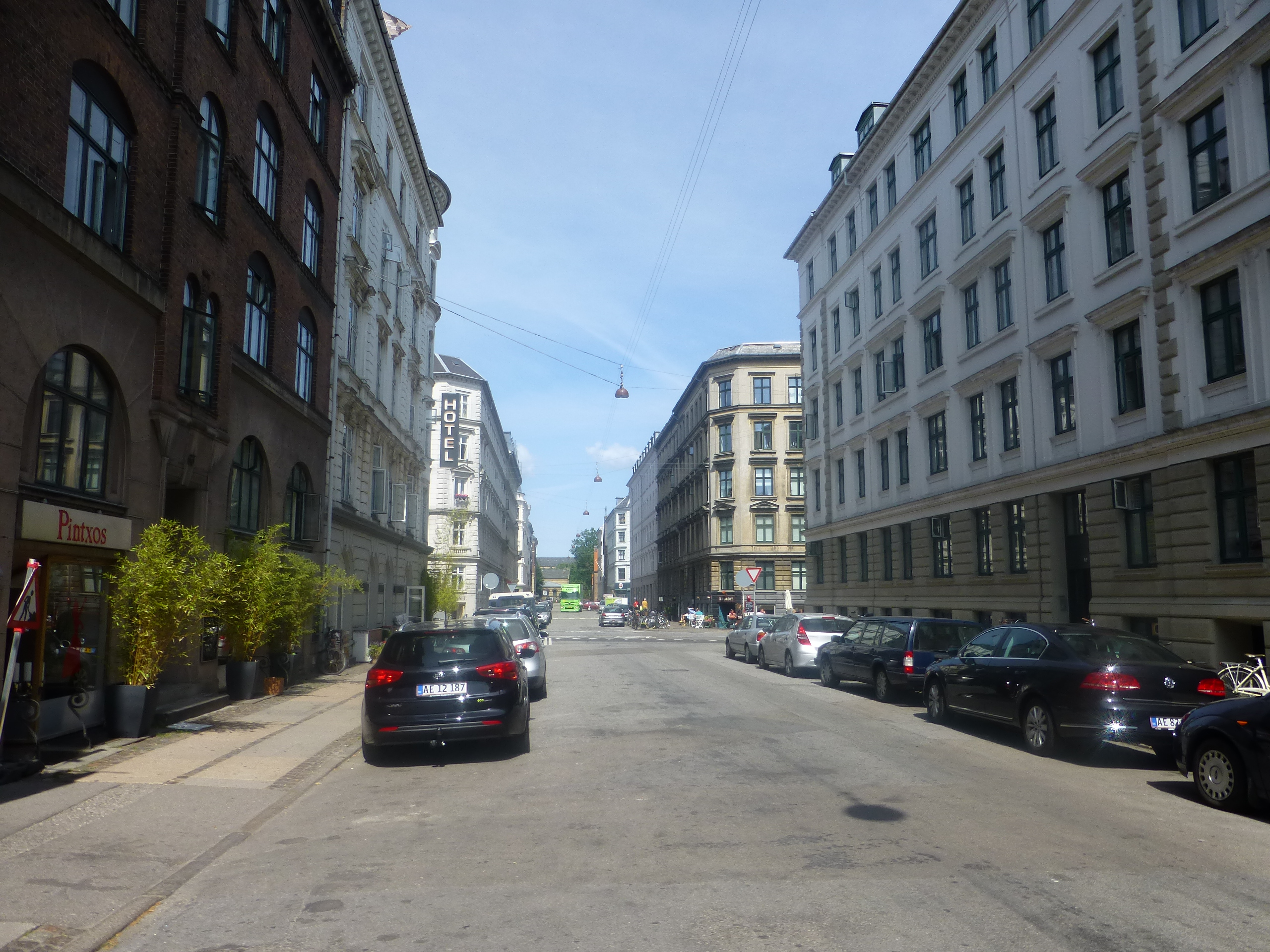 The street Nansensgade in Indre By in Copenhagen.